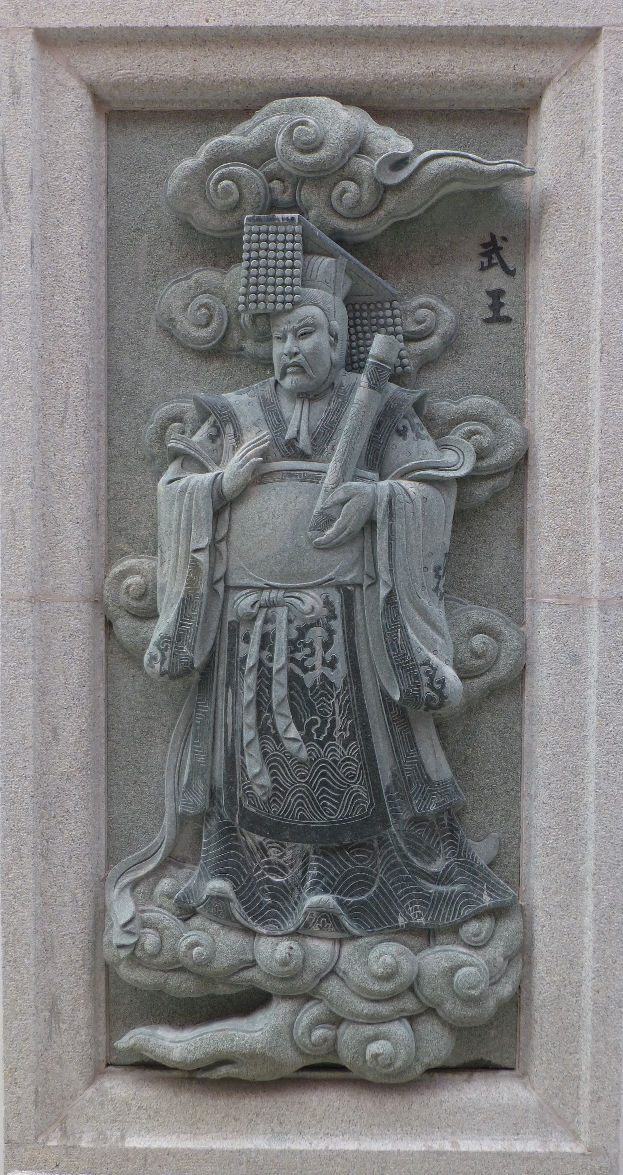 009 King Wu-Wuwang, Investiture of the Gods at Ping Sien Si, Pasir Panjang, Perak, Malaysia Photograph from the Ping Sien Si Temple in Perak, Malaysia taken by Anandajoti.